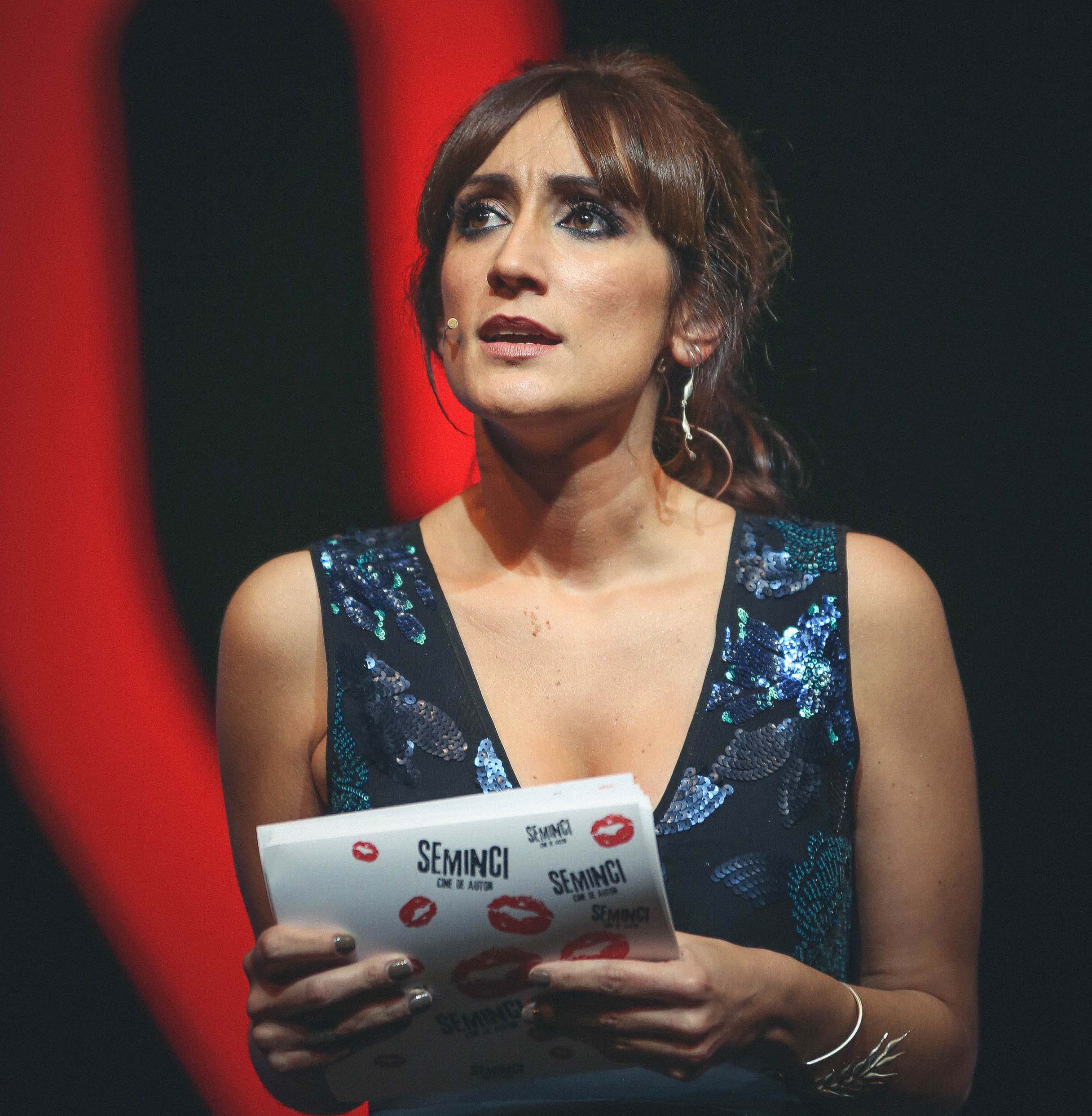 Seminci 2016